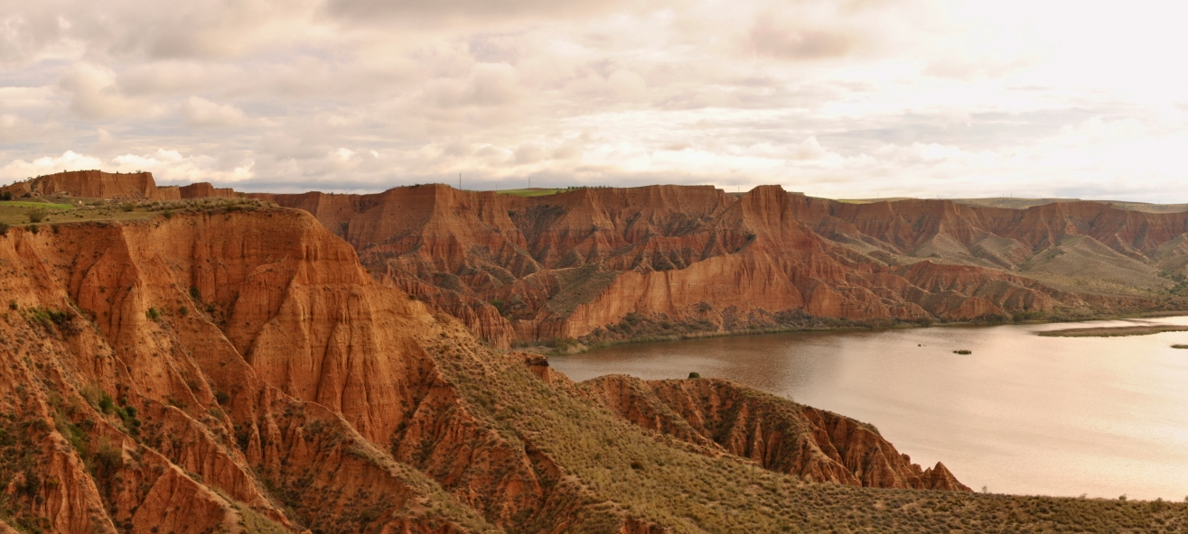 Barrancas de Burujón - Toledo - Spain